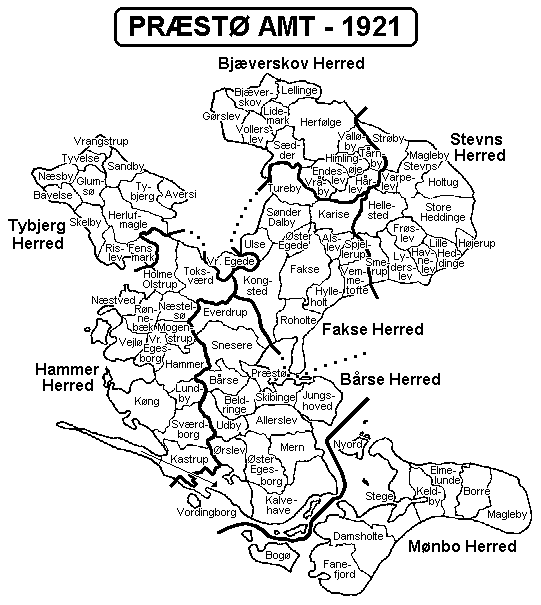 Præstø Amt 1921, Denmark. Map by Svend-Erik Christiansen